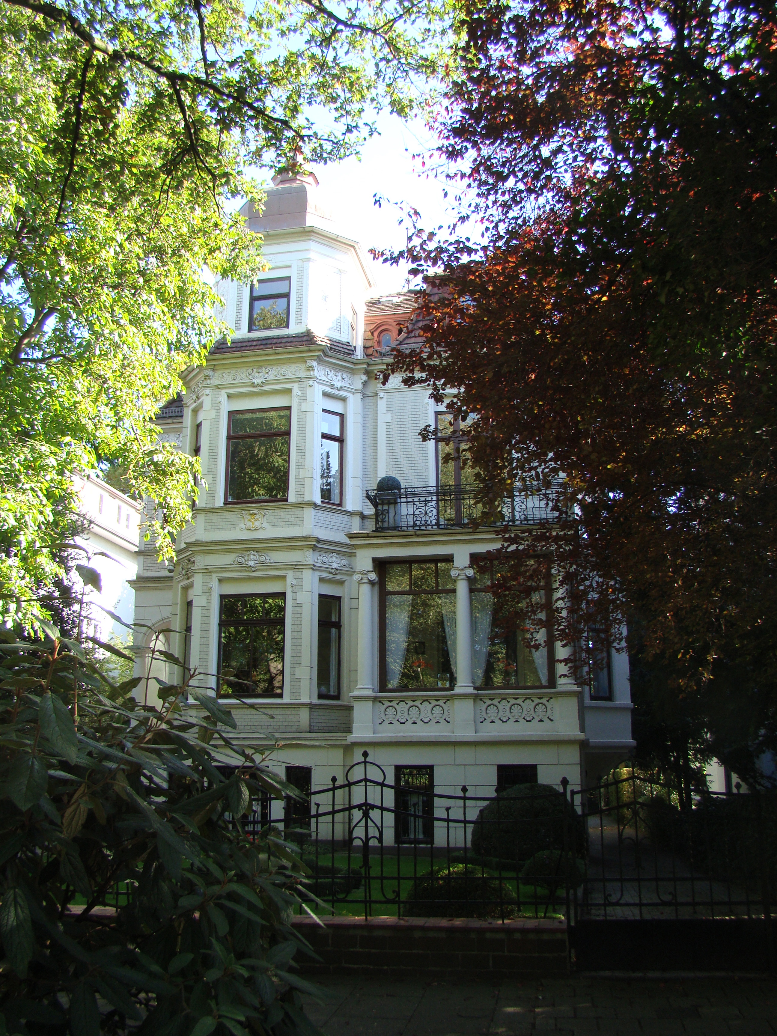 Villa Hunckel in Bremen, Parkallee 107.Das abgebildete Objekt ist ein geschütztes Kulturdenkmal in der Freien Hansestadt Bremen, mit der Nr. 1001 beim Landesamt für Denkmalpflege registriert.